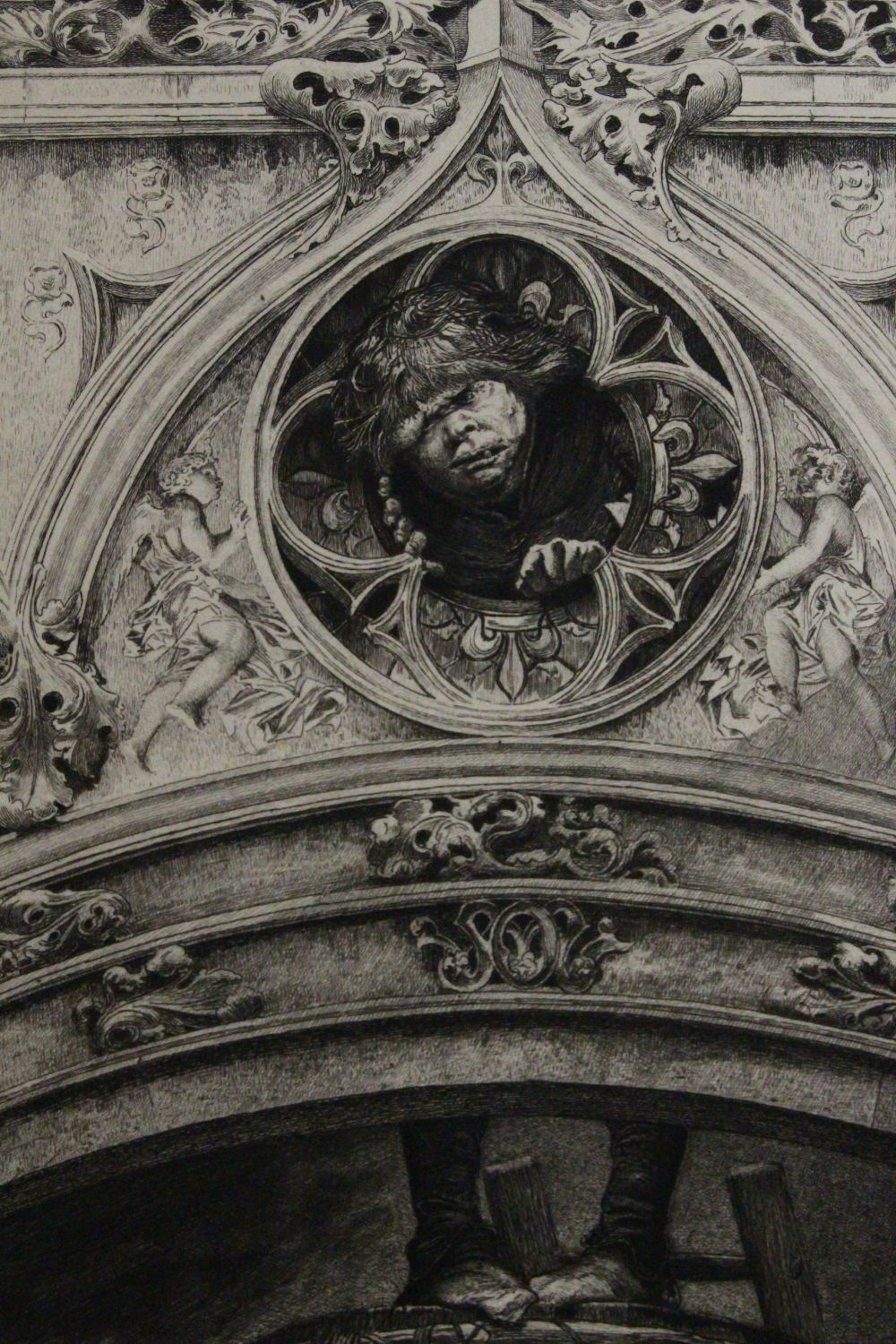 Luc-Olivier Merson - Quasimodo